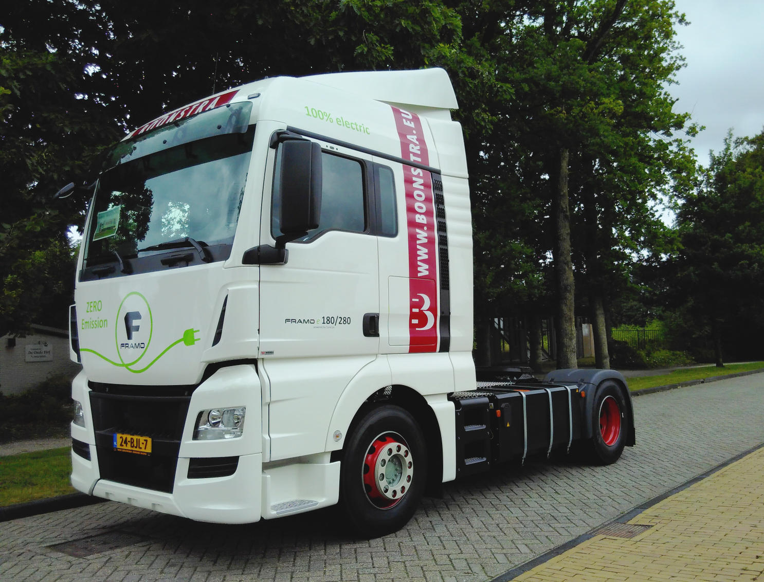 Framo E180/280 4X2 BLS electric truck, Netherlands (1 juli 2017)